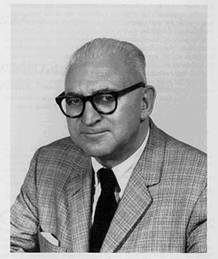 Naixement: 13 de febrer de 1902, Illinois, Estats Units Defunció: 18 de desembre de 1978, Nova York, Nova York, Estats Units Formació: Universitat de Chicago